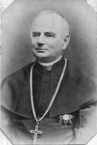 Josef Hanel (1823 - 1903), Český kněz, teolog a pedagog.